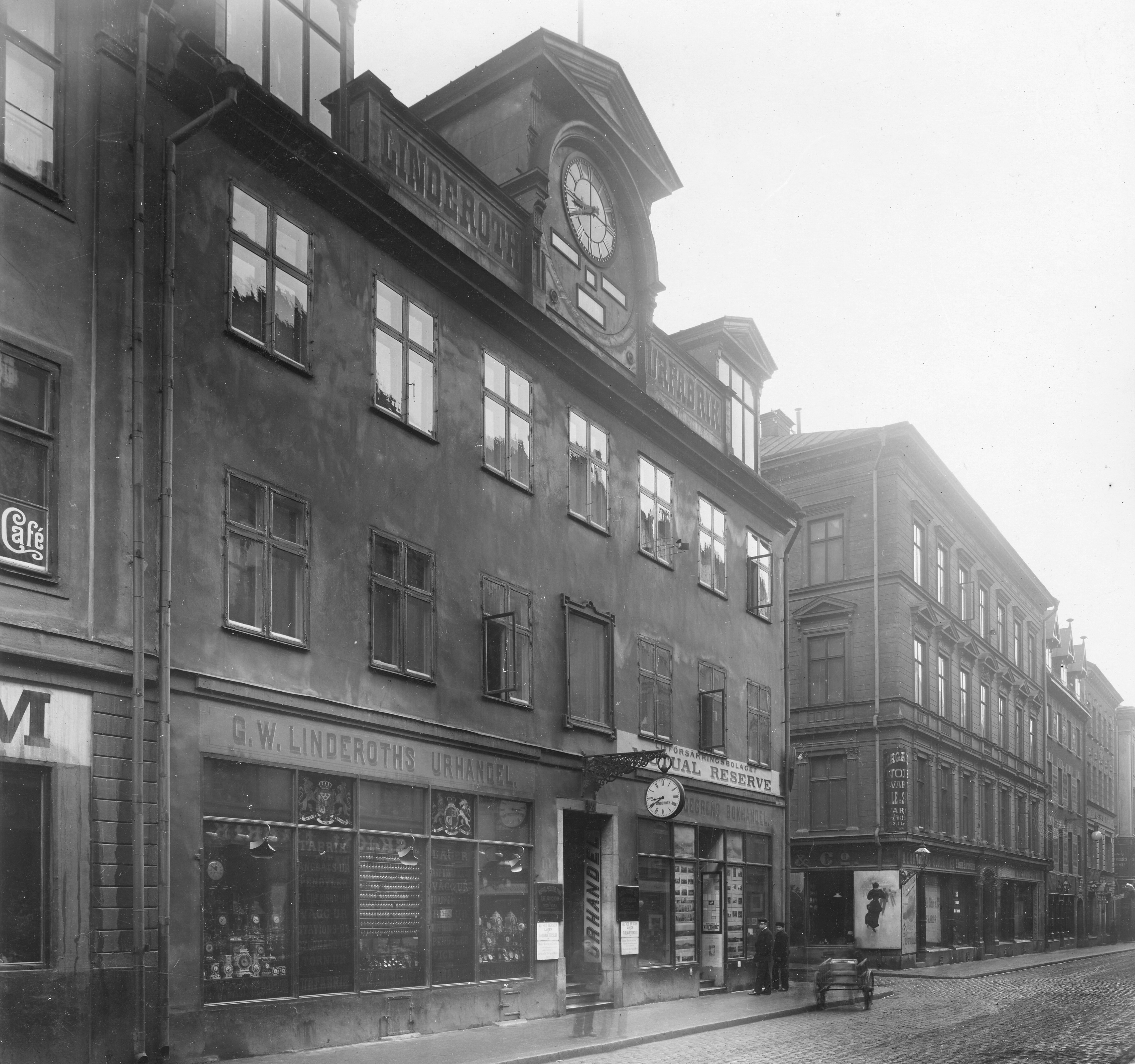 Linderoths urfabrik, Drottninggatan 28, 1895. Byggnaden ursprungligen uppförd 1649 av Jonas Mattsson Loverus. Linderoths urfabrik 1855-1963. Rivet 1968.